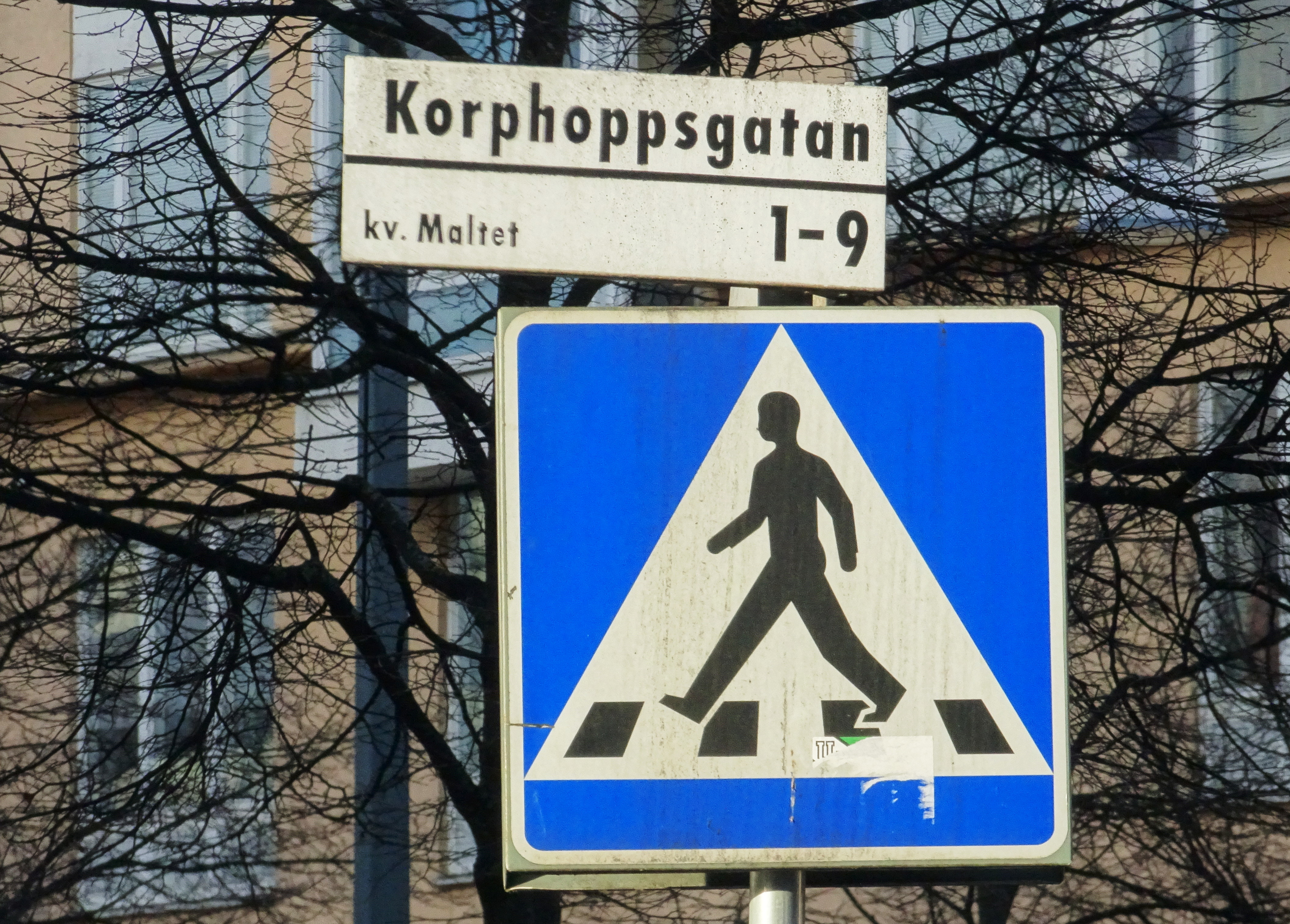 Korphoppsgatan i Hammarby sjöstad